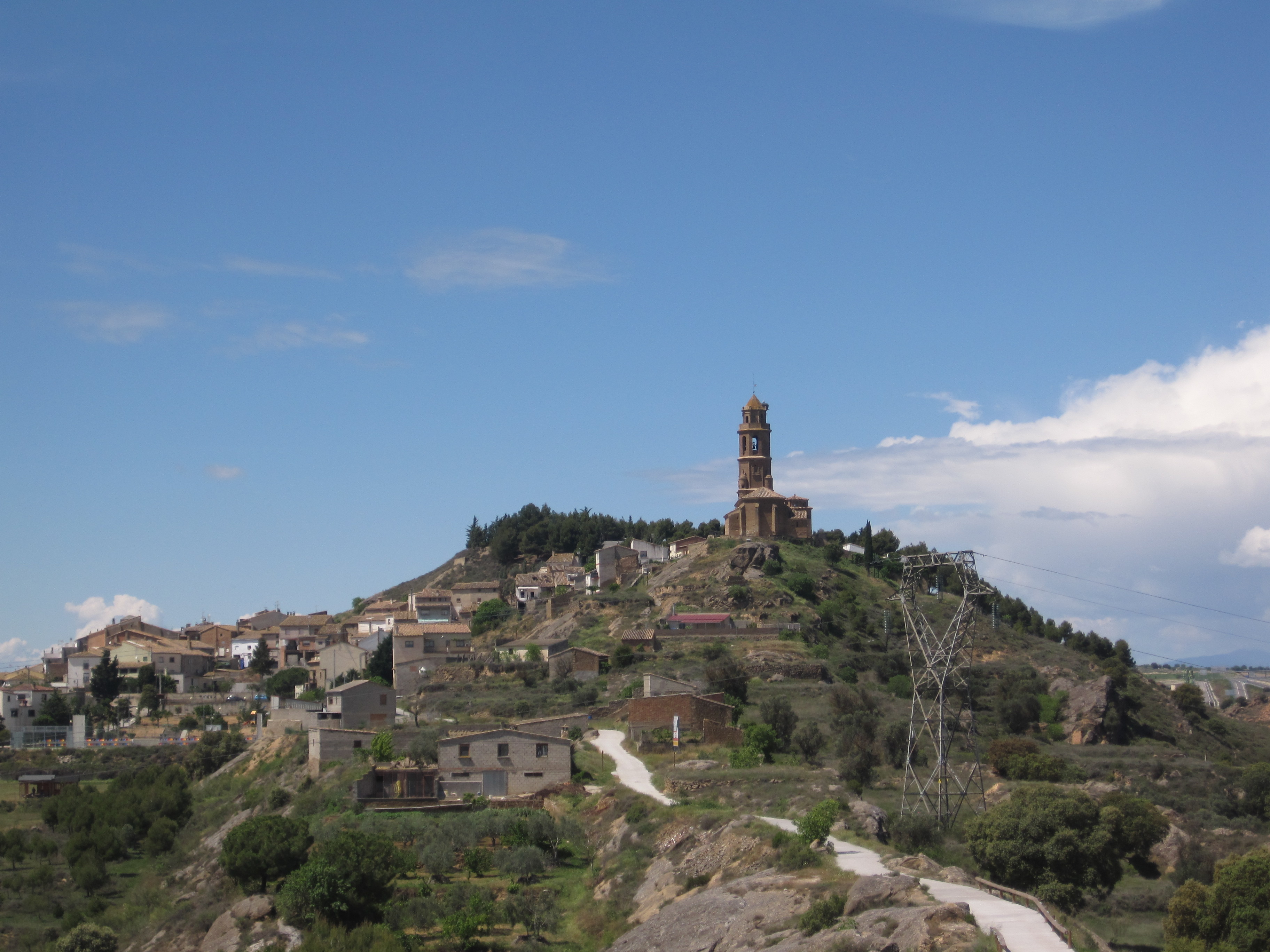 Aragonés: Castillón d'o Puent, Semontano de Balbastro, Aragón.